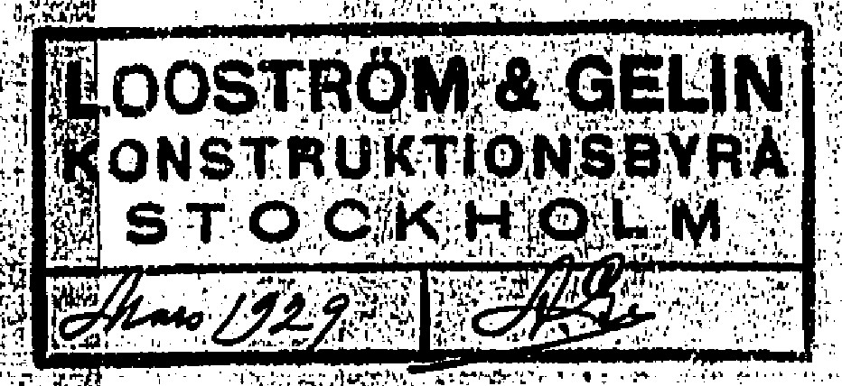 Humlegården 57, K-ritning, stämpel, Looström & Gelin